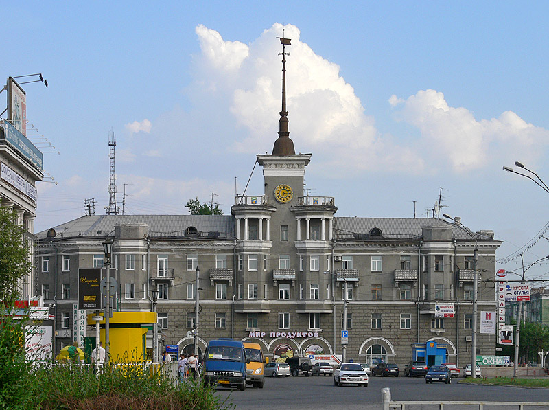 Budova "Světu produktů" v Barnaulu, Rusko